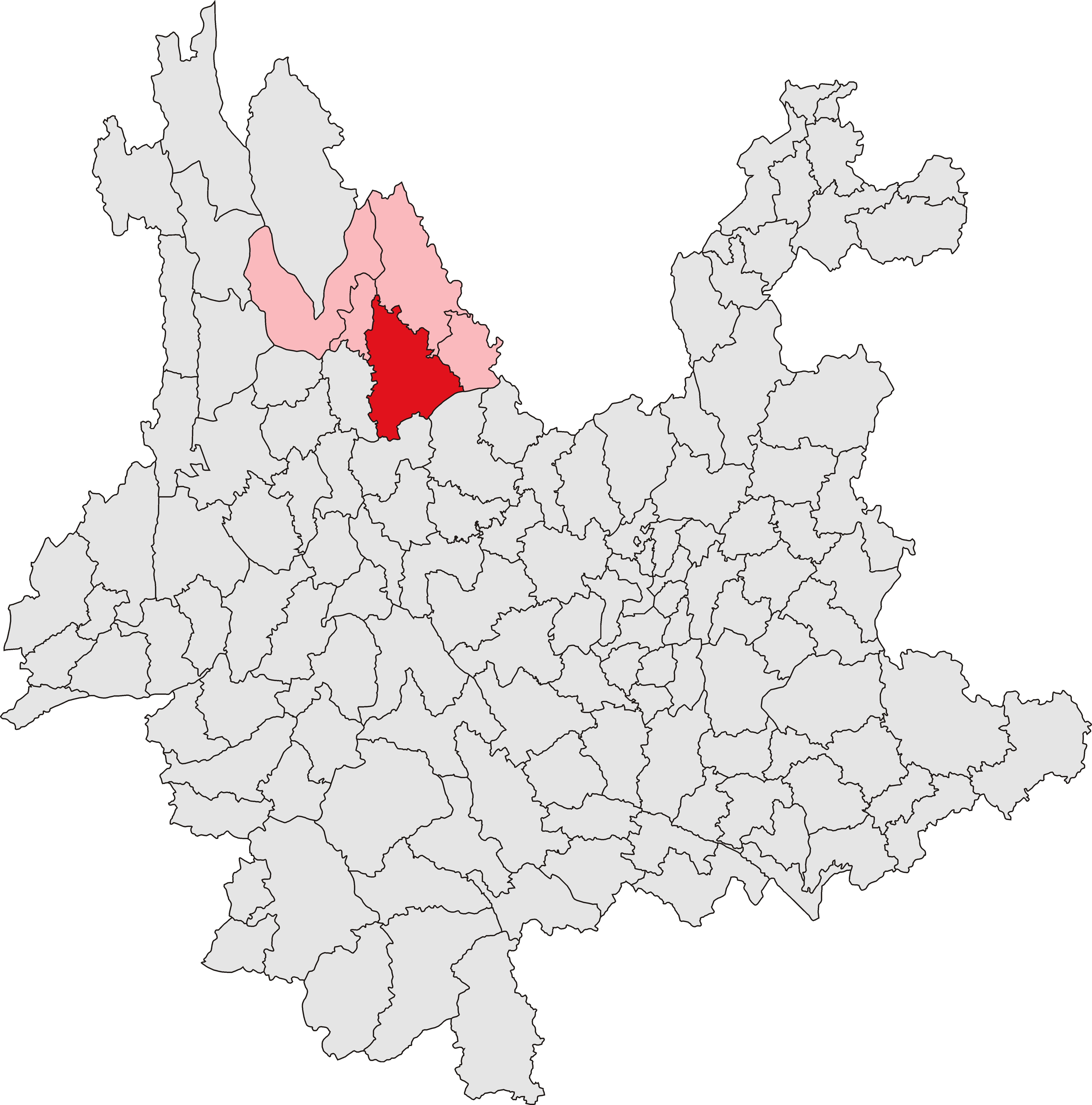 中文（中国大陆）: 永胜县位置图